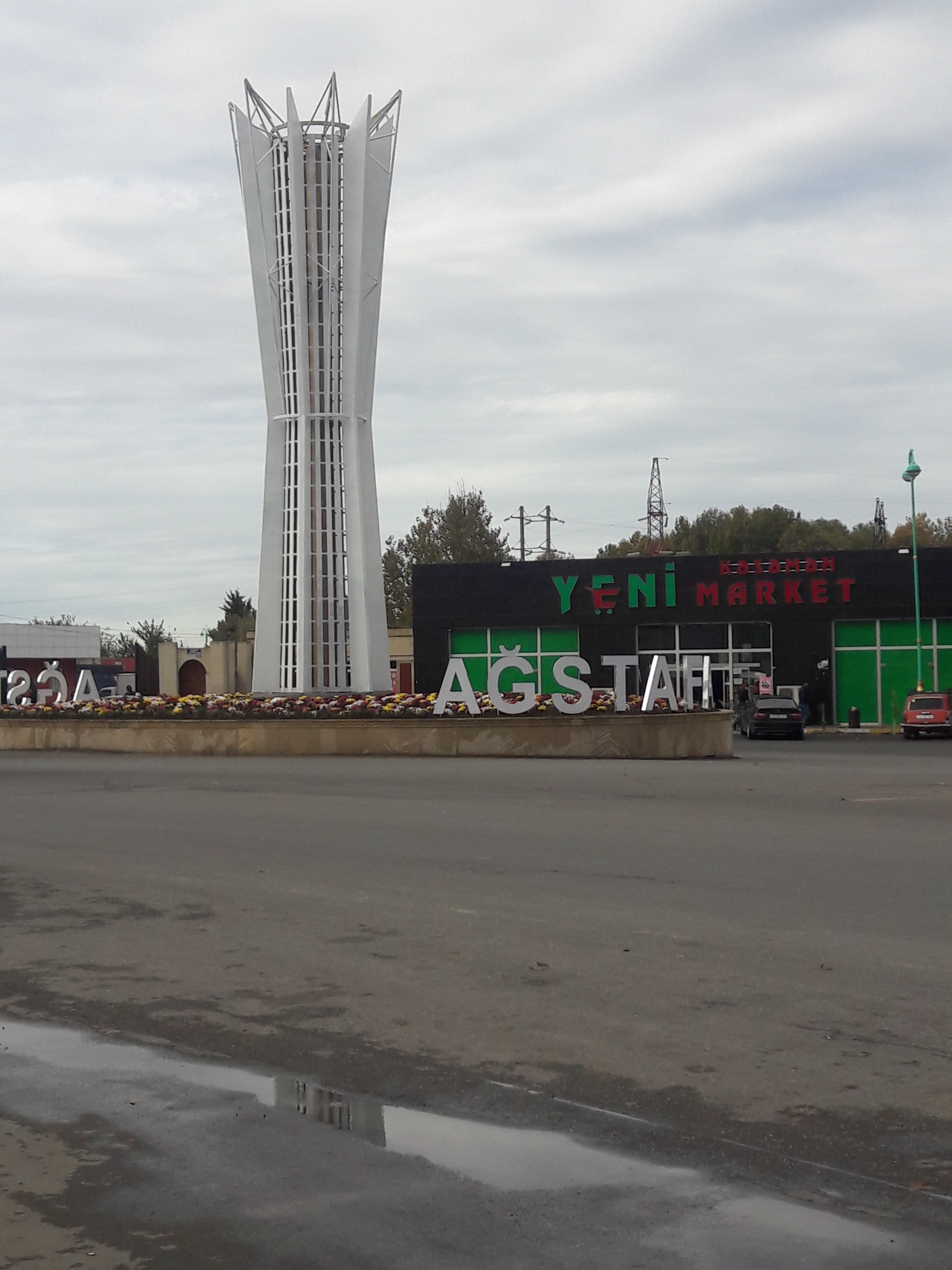 Ağstafa 2019-11-02